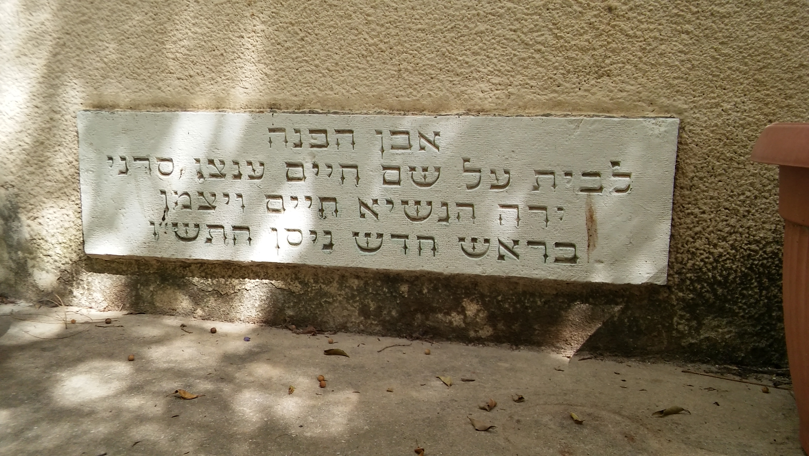 בית סרני גבעת ברנר - אבן פינה